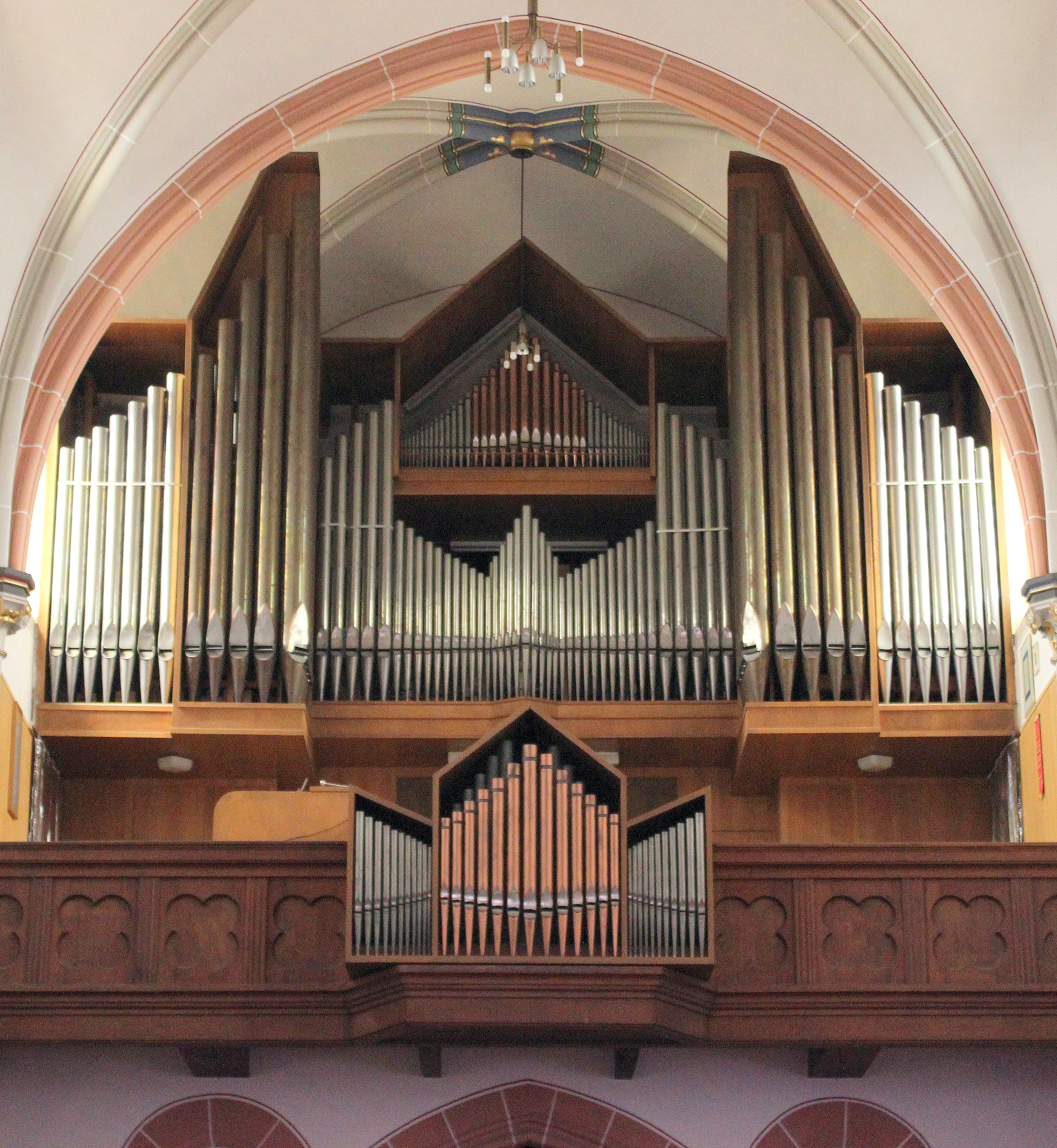 Orgelprospekt der katholische Pfarrkirche St. Martin in Schwalbach, Landkreis Saarlouis, Saarland